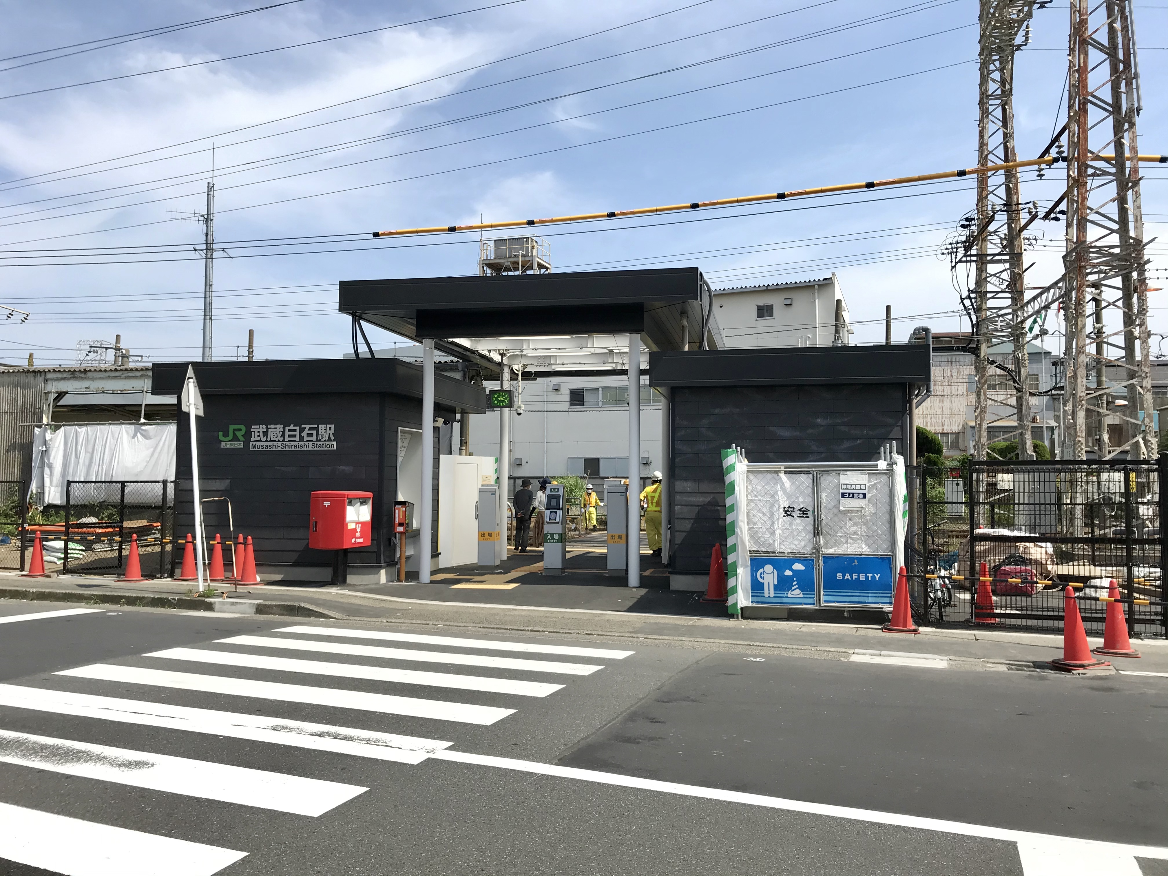 JR東日本鶴見線武蔵白石駅駅舎